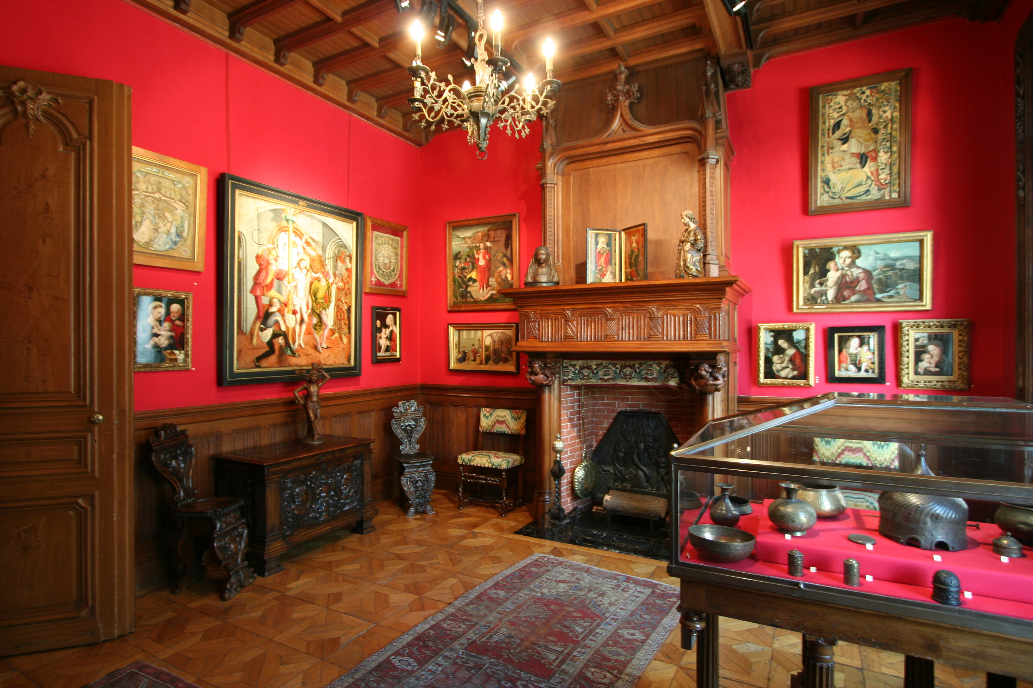 Salle des primitifs au premier étage du Musée Grobet-Labadié à Marseille.